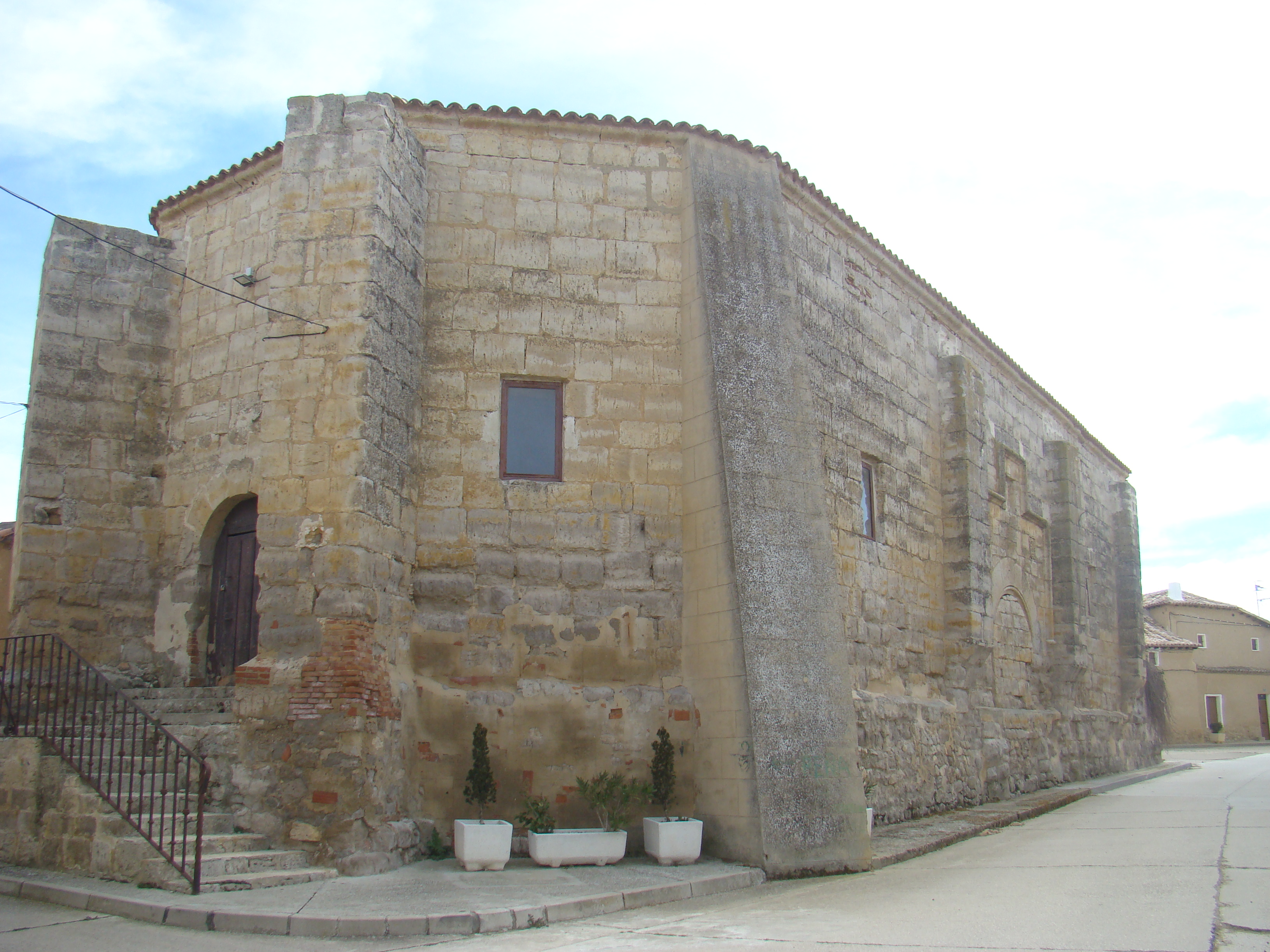 Torremormojón en Palencia, España. Iglesia del antiguo monasterio de la Piedad.